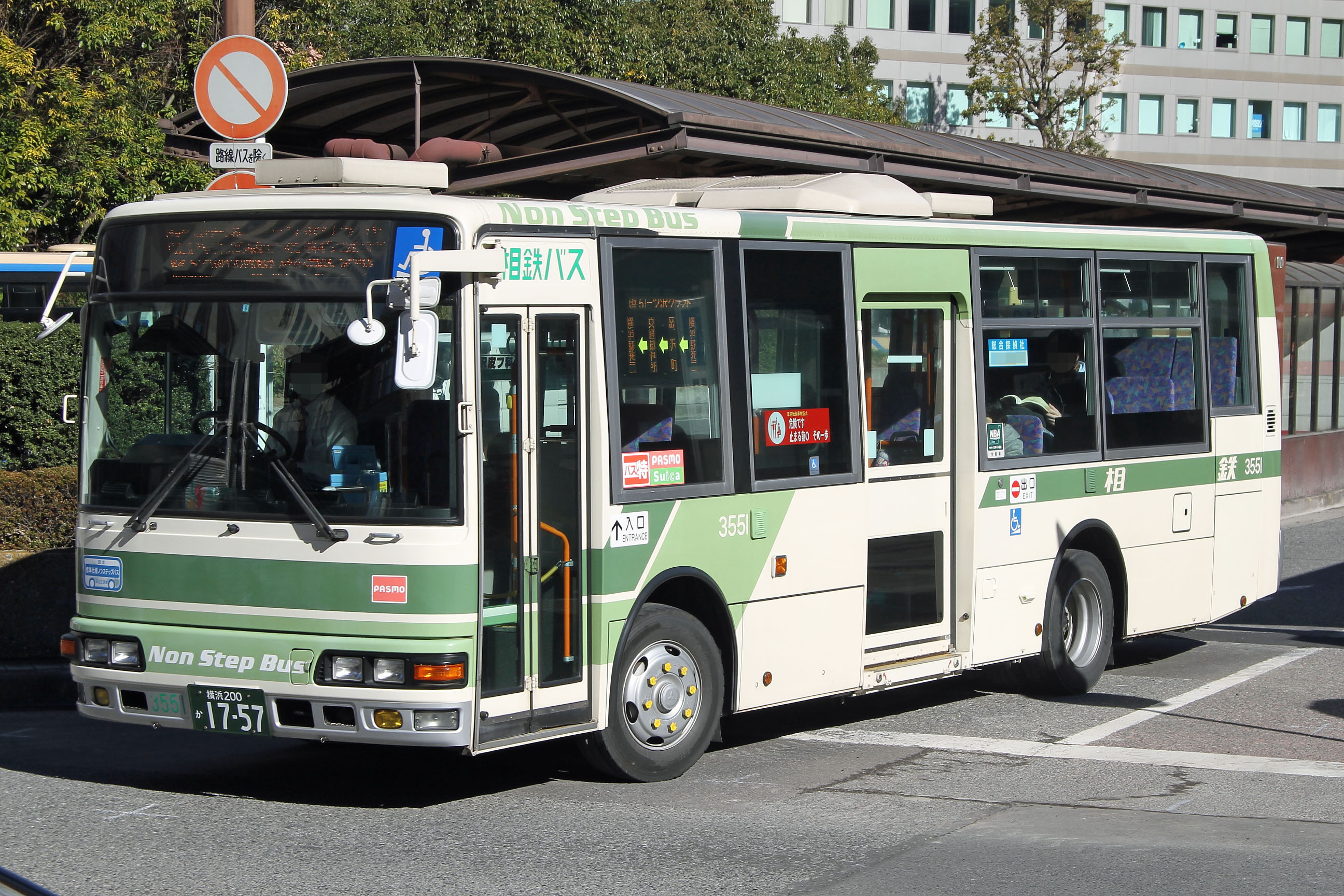 Sotetsu Bus car 相鉄バスの車両